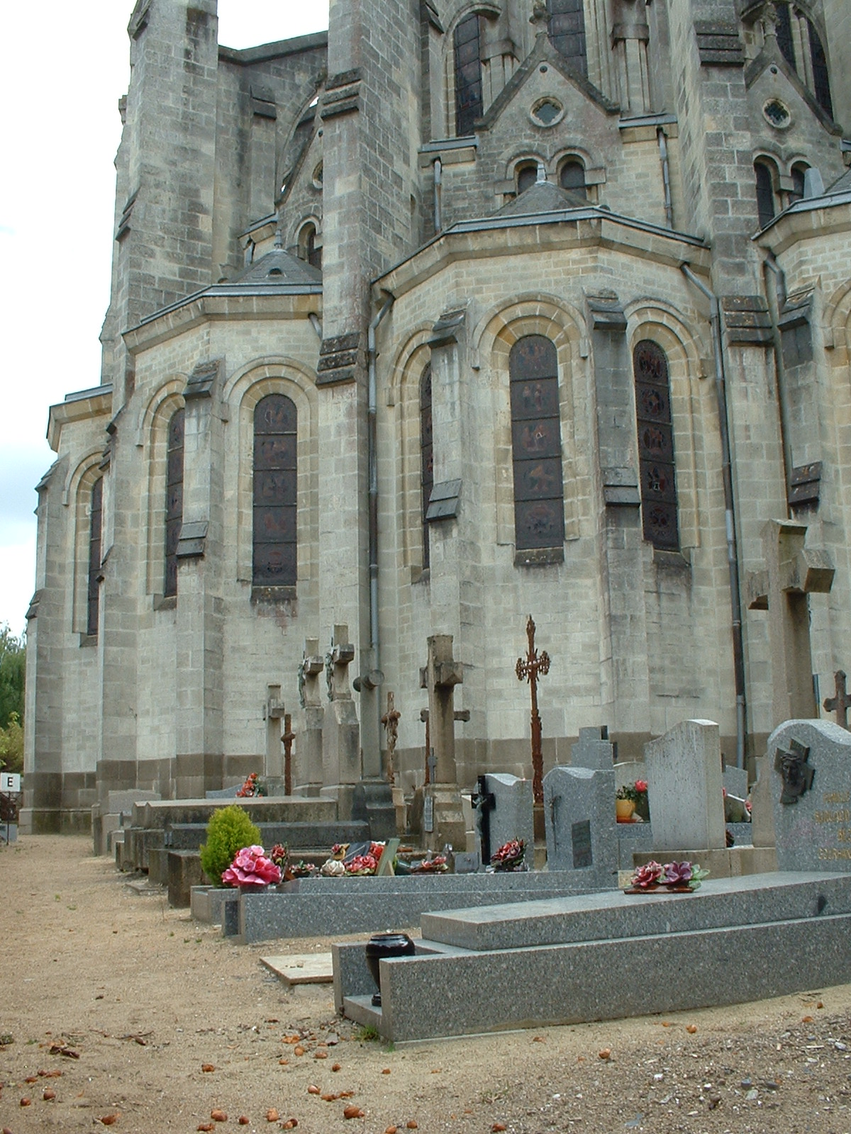 Nantes - Cimetière Saint-Donatien - Tombes aux pieds de l'église